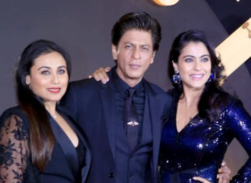 Rani Mukerji, Shah Rukh Khan and Kajol di selebrasi 20 tahun Kuch Kuch Hota Hai, 2018